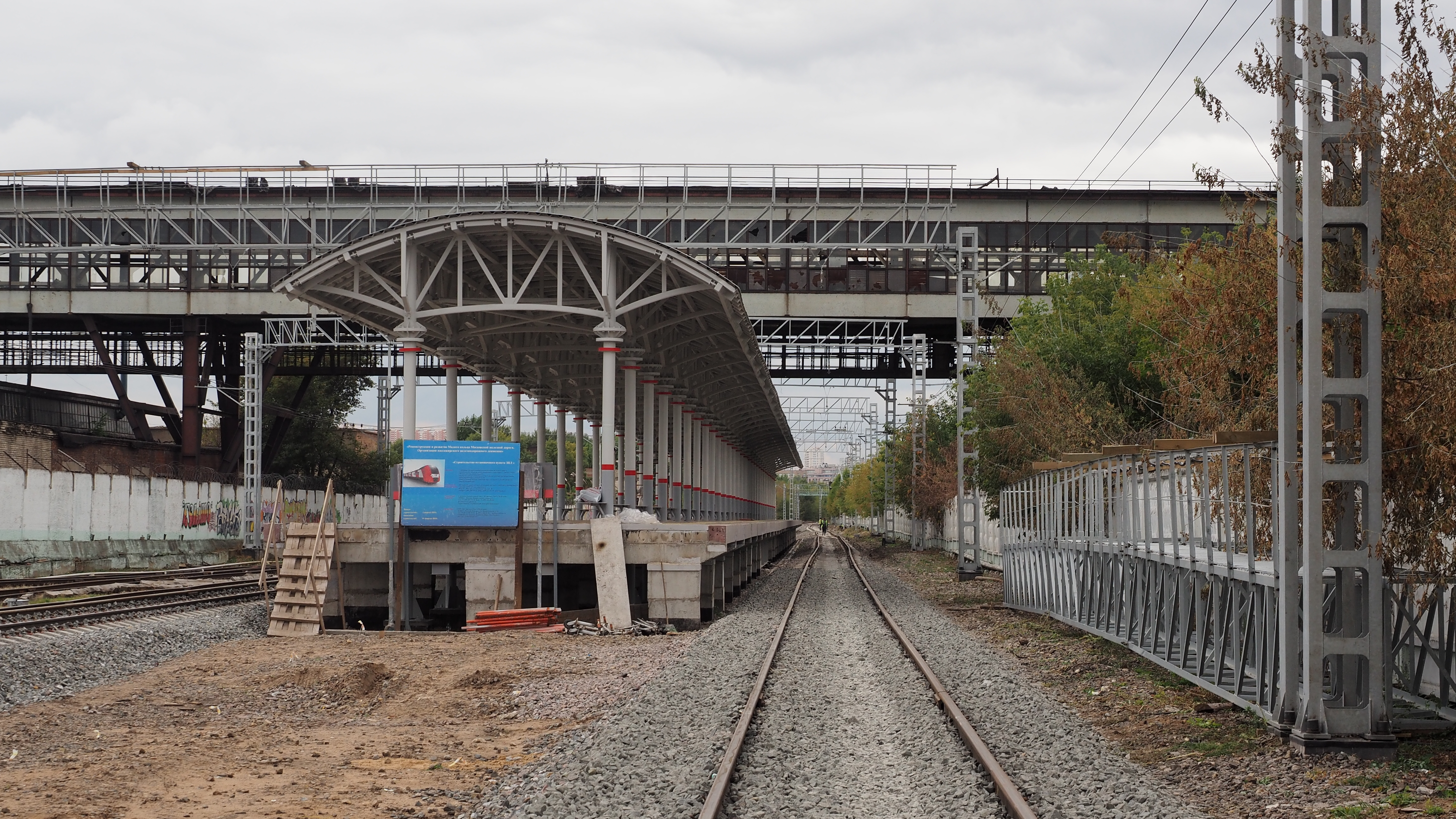 Строительство платформы ЗИЛ МКЖД. Сверху проходит автомобильный путепровод между территориями ЗИЛа, который потом снесли, а пешеходного путепровода ещё нет.